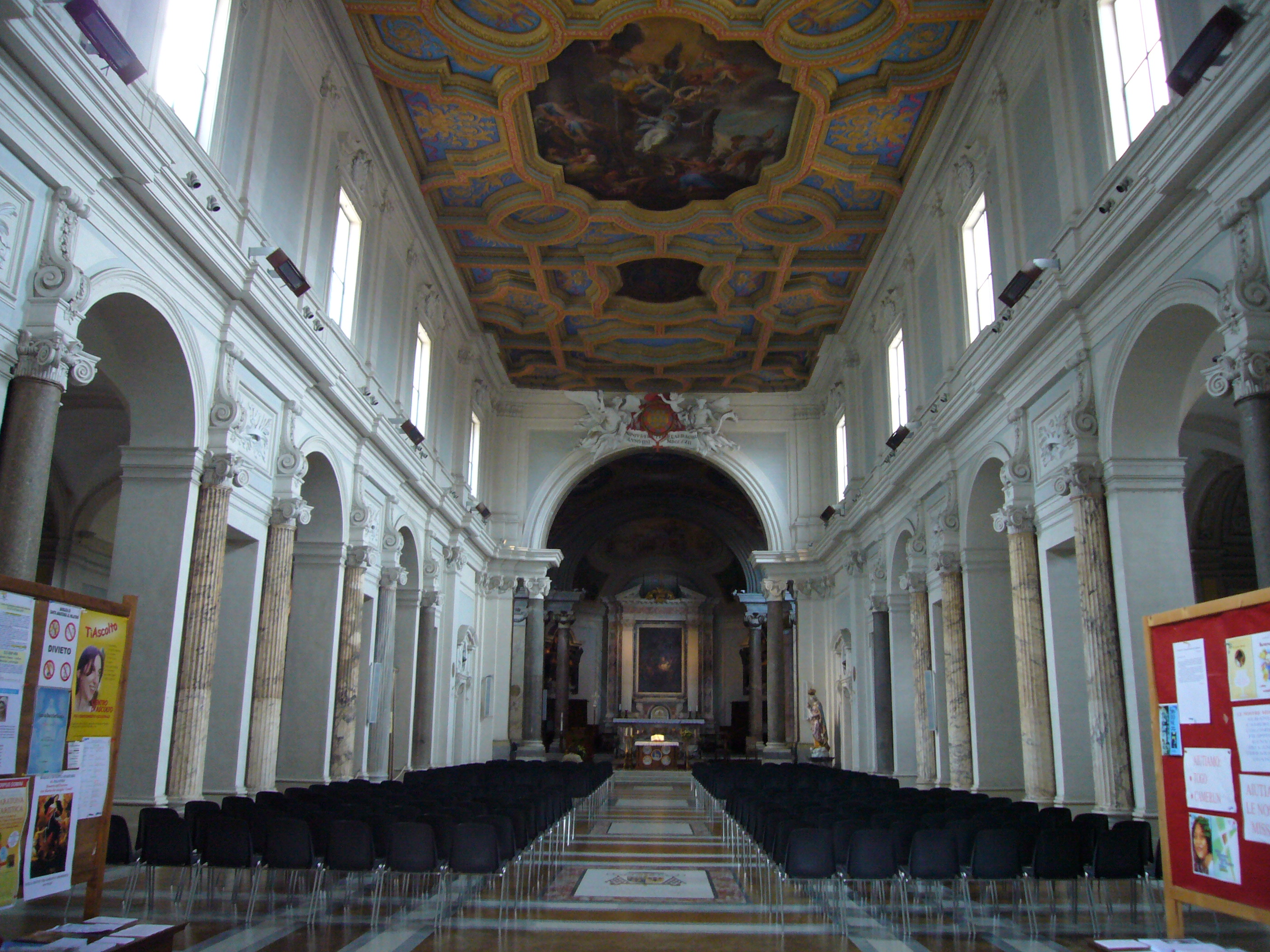 Roma, sant'Anastasia: interno